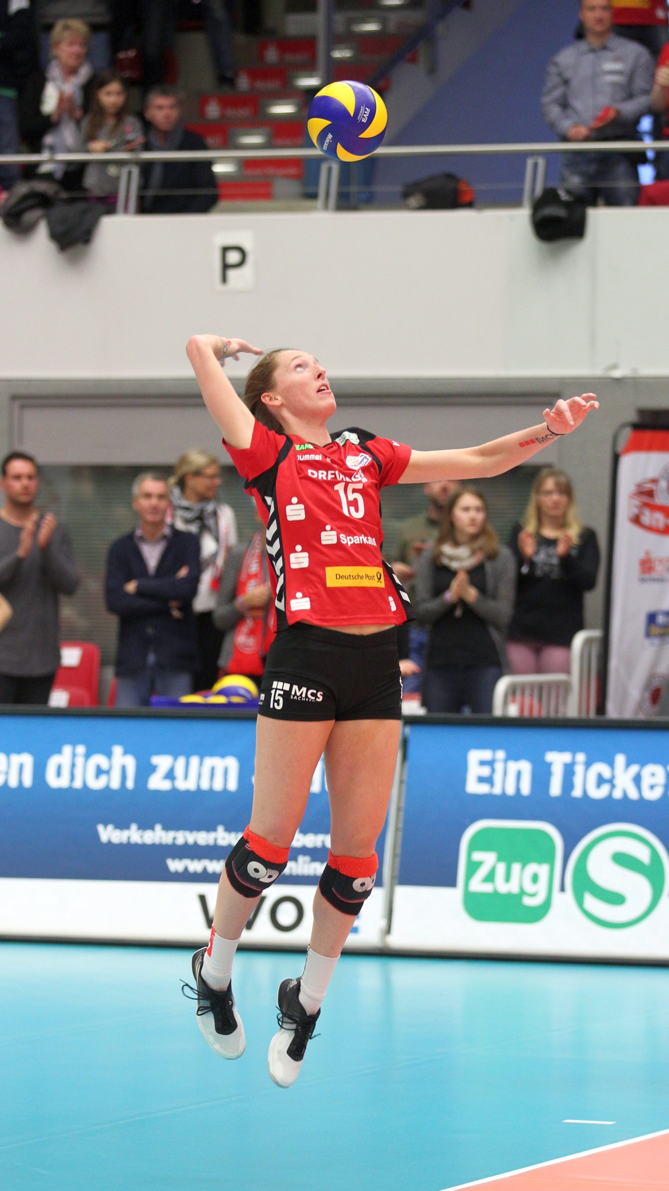 Kadie Rolfzen beim Play-off-Viertelfinale Dresdner SC gegen Rote Raben Vilsbiburg, 18. März 2017